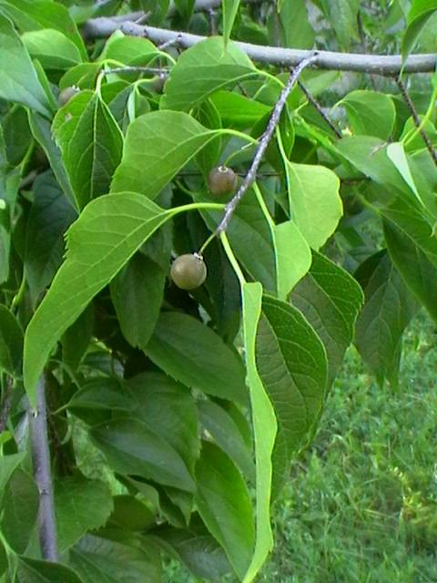 Česky: Celtis australis, Brno Komín, Czech republic